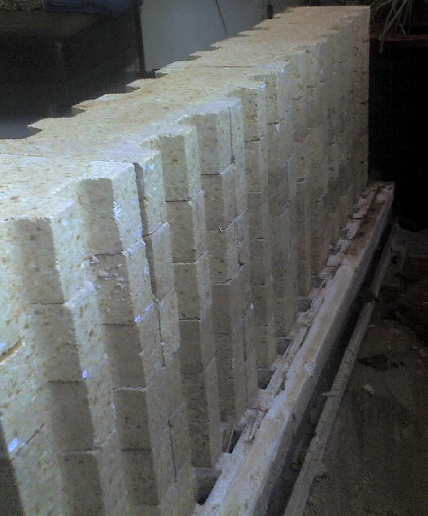 Schamottsteine einer Nachtspeicherheizung, in denen sich die Heizstangen befinden.